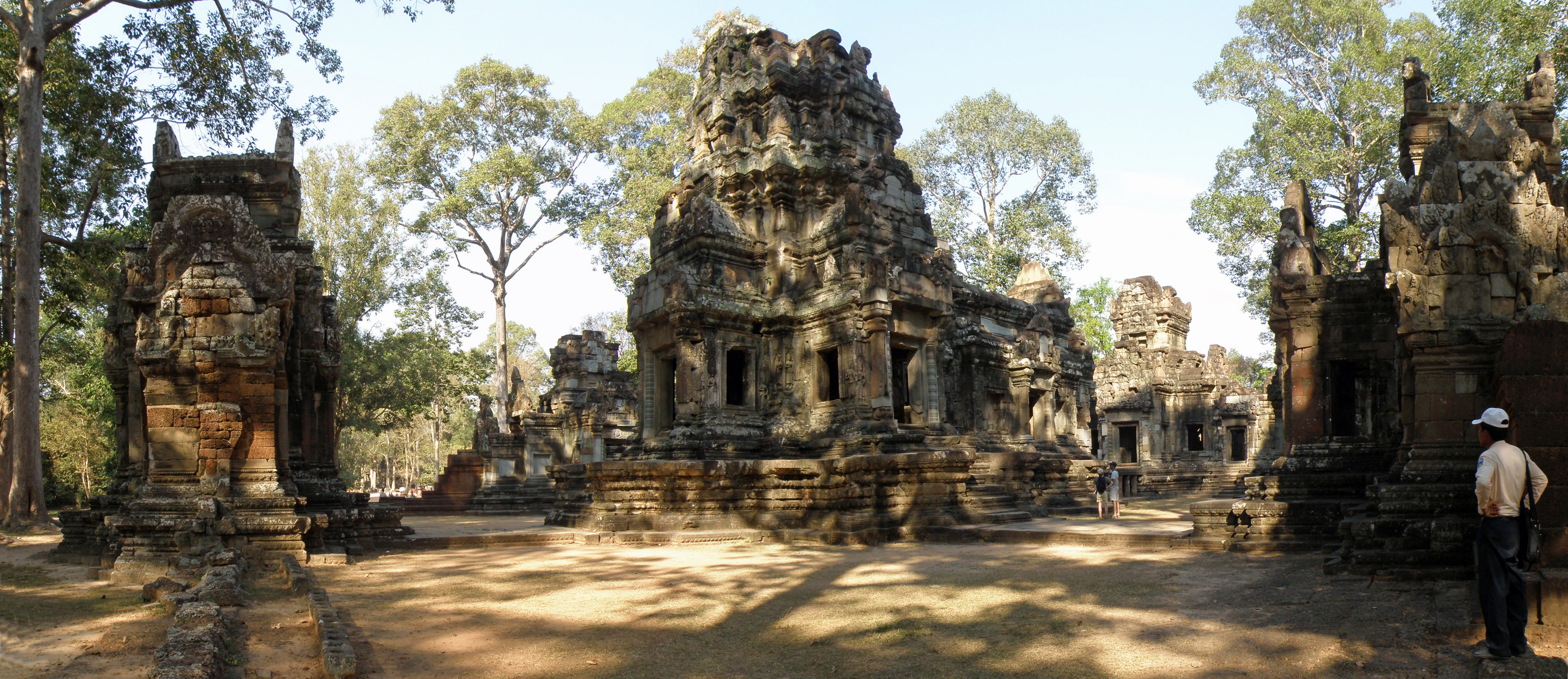 Thommanon forme avec Chau Say Tévoda une paire de joyaux du début du 12ème siècle - Angkor - Cambodge